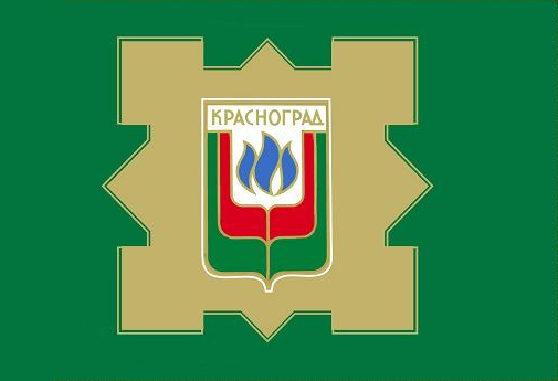 Прапор Краснограда